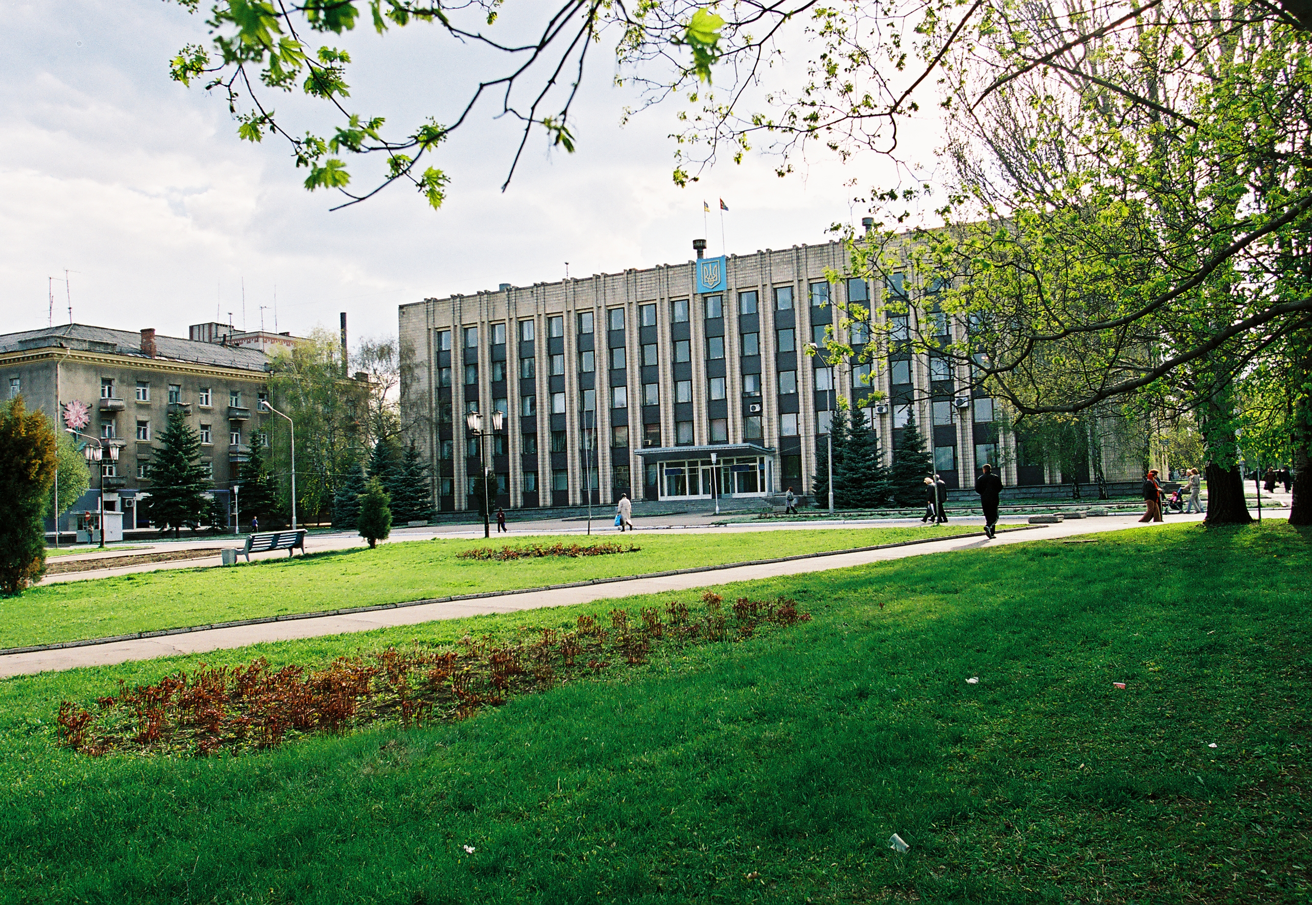 Фото Анастасии Федоренко